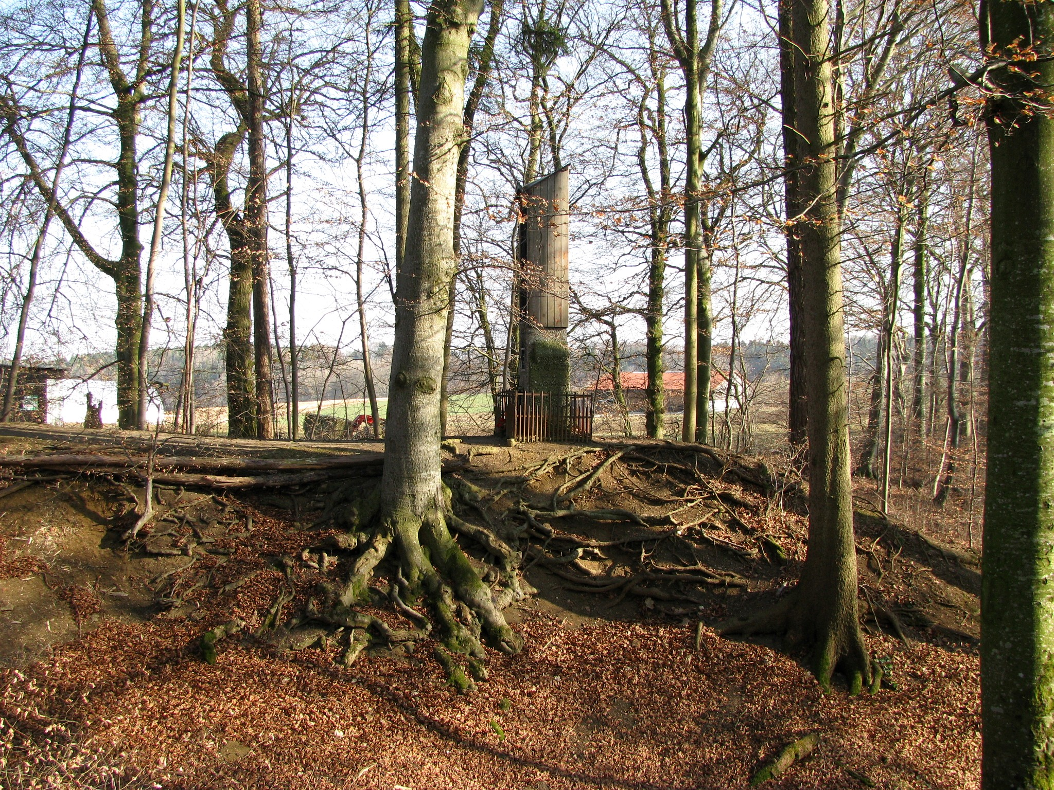 Burgstall Engelsberg nach Südosten; vergitterter Holzkasten mit Marienstatue; dahinter Bebauung der Einöde Kreuth